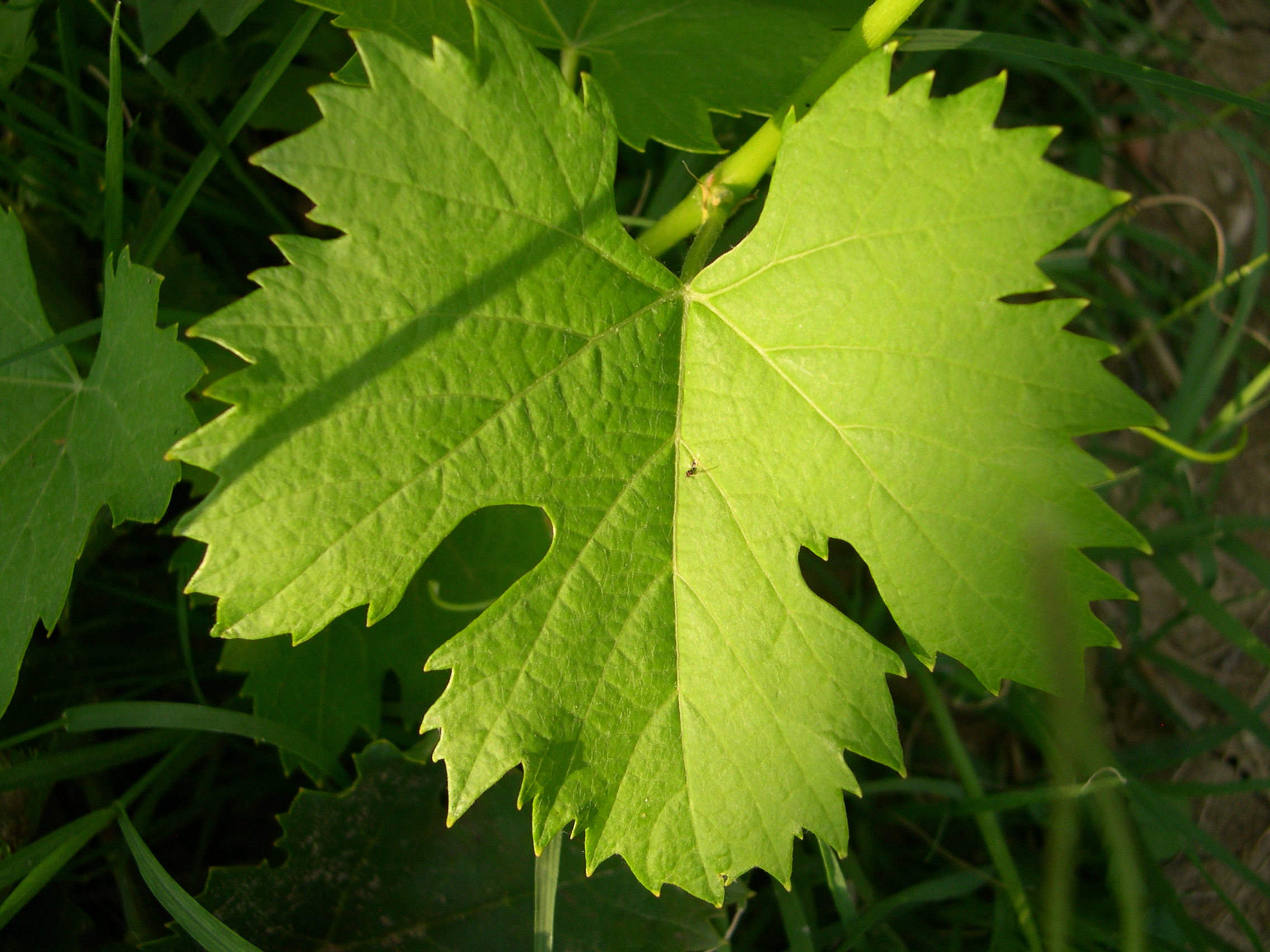 Foglia tipica di pianta di vite (Vitis vinifera)